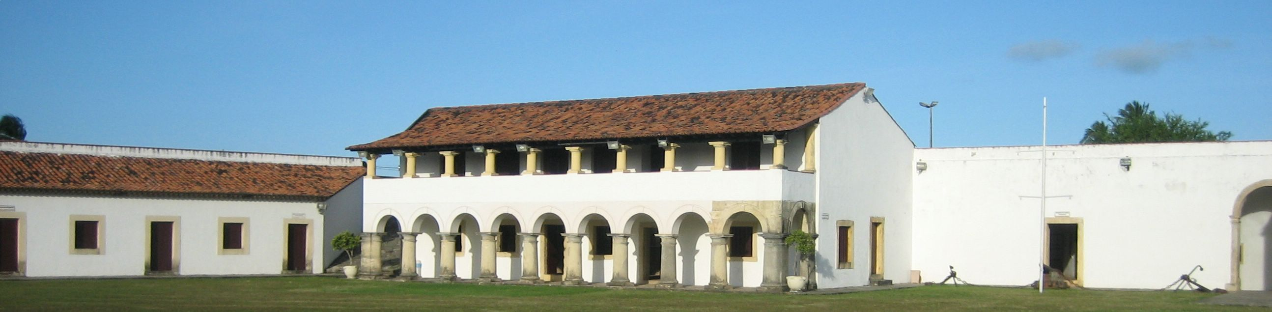 Fortaleza Santa Catarina, Barracks and commanders house, Cabedelo, Paraíba, Brasil